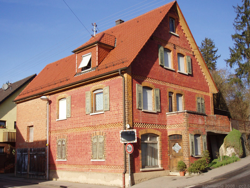 Hist. Wohnhaus, Finkenbergstraße 21, Heilbronn-Biberach